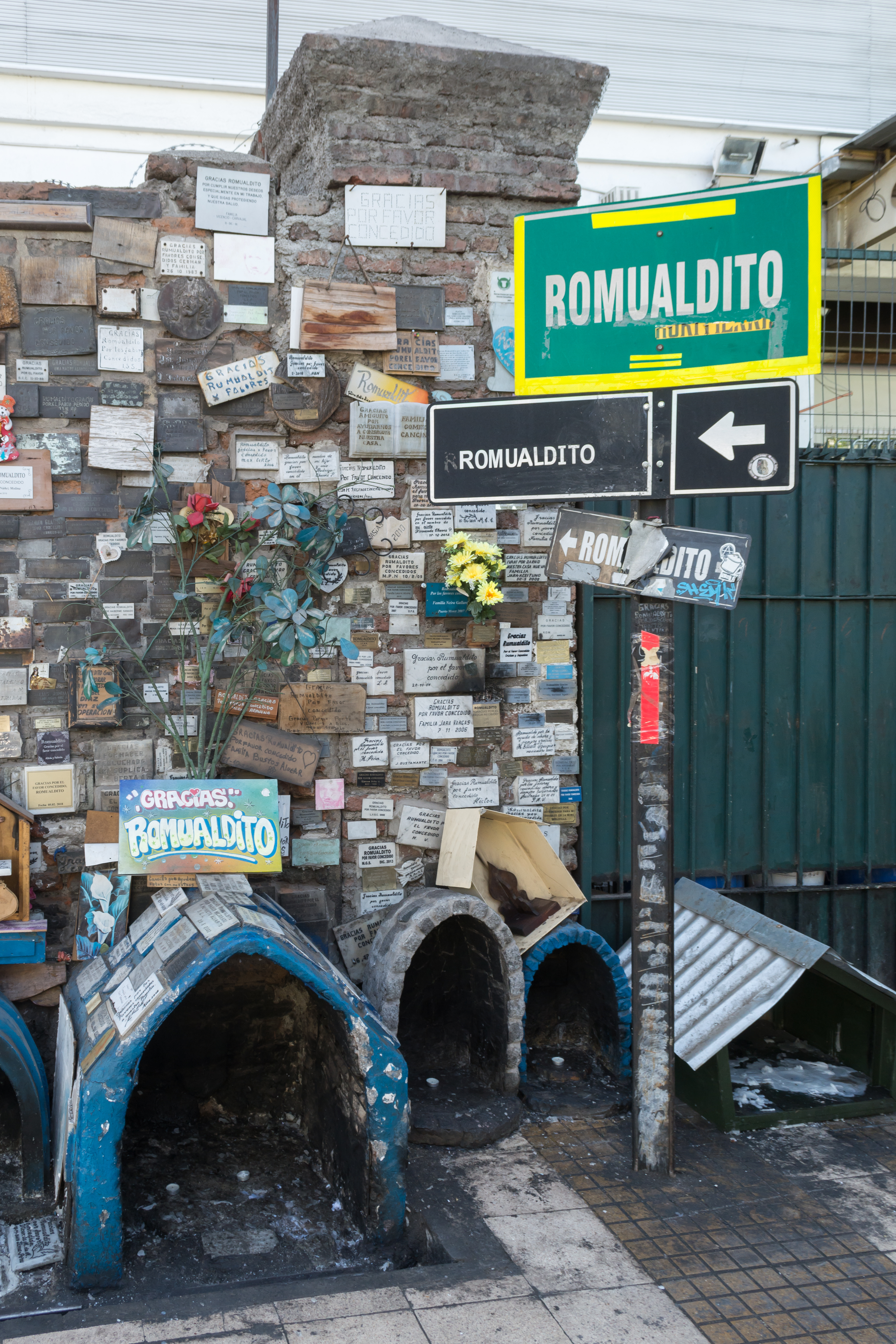 Animita de Romualdito, Estación Central, Santiago, Región Metropolitana, Chile